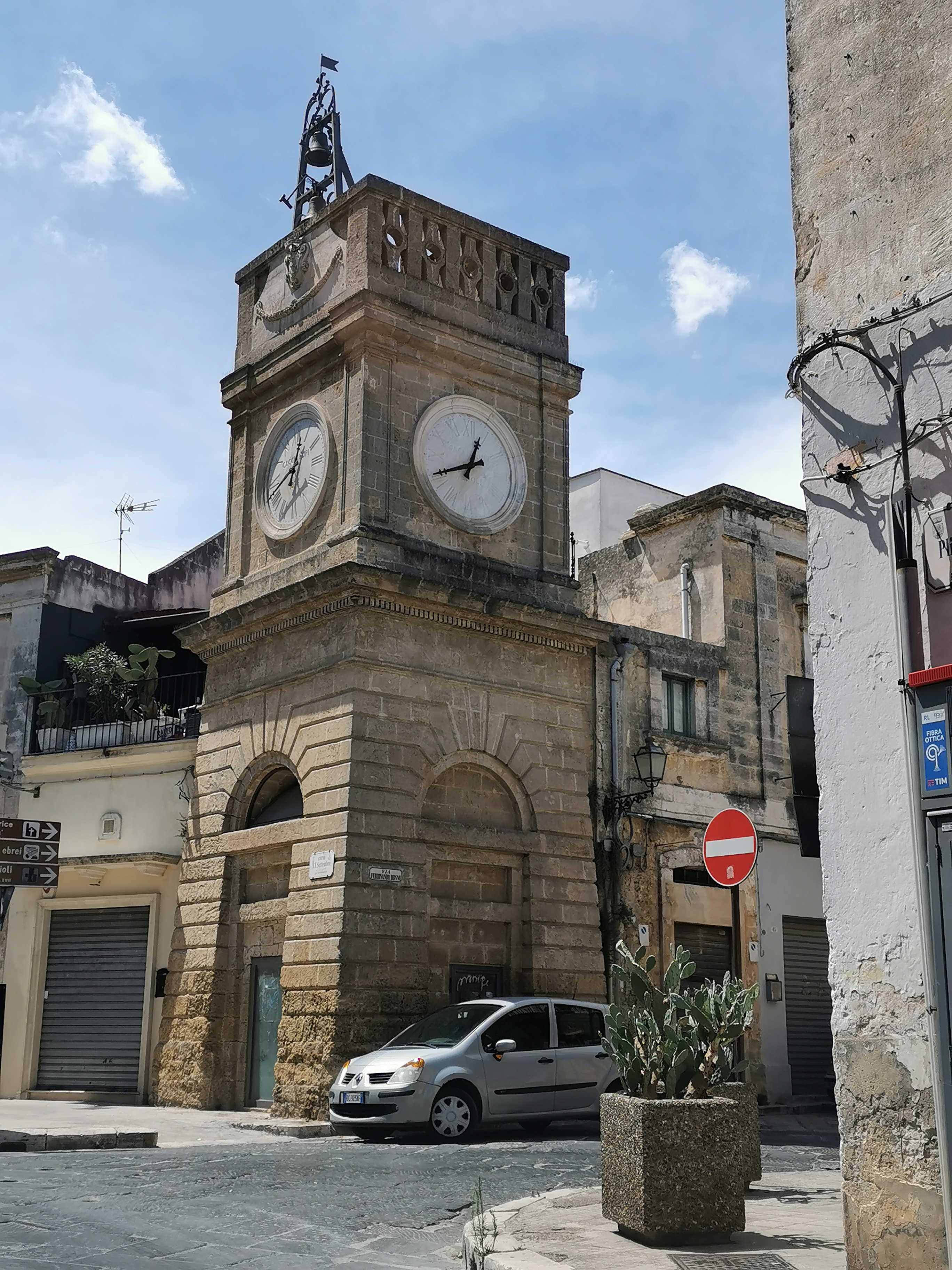 Torre dell'orologio di Manduria.